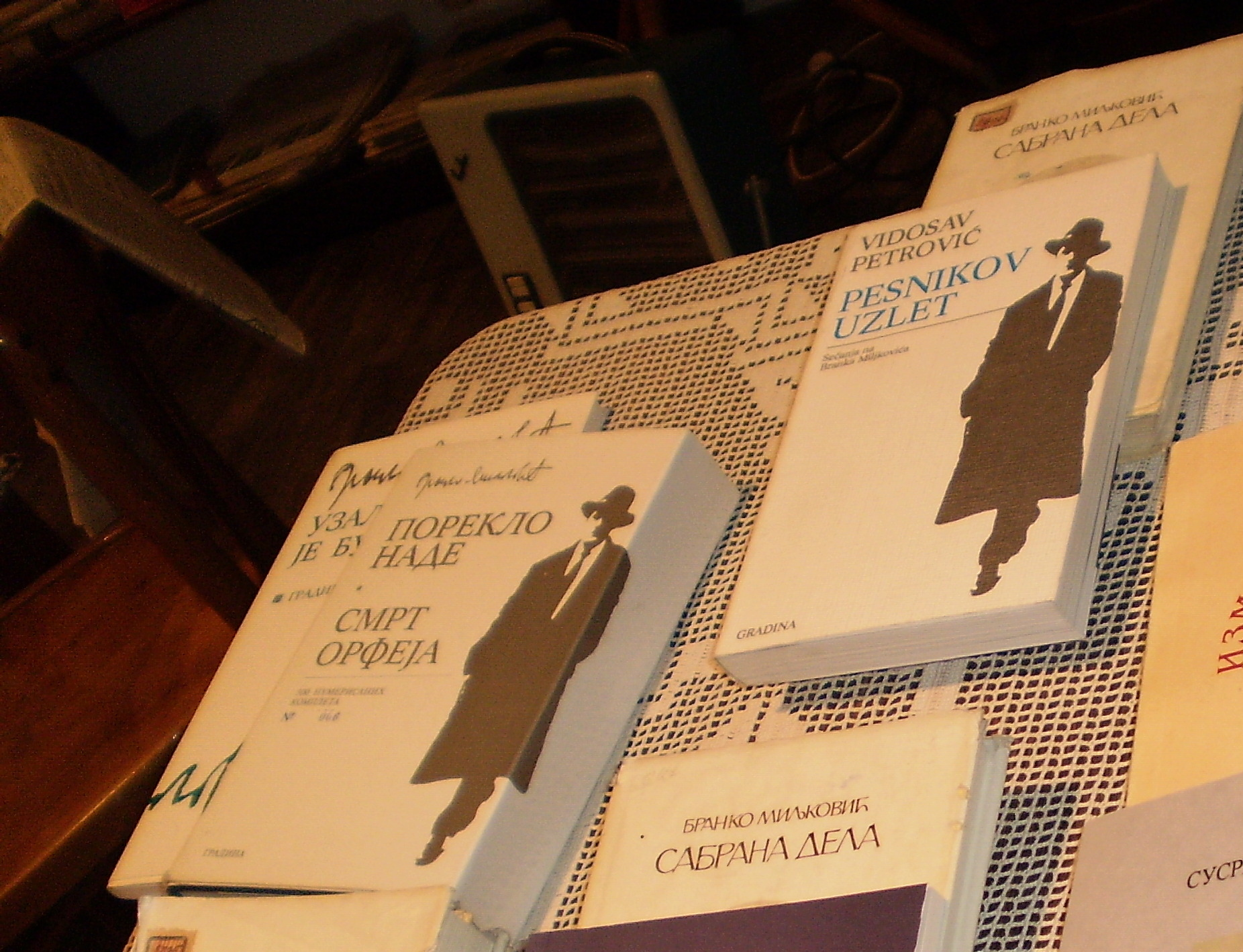 Srpski (latinica): Deo knjiga o Branku Miljkoviću književniku iz Niša. Autor dr Milorad Dimić, Niš 29. septembar 2011. Opremu knjige obavio je Dragan Đ. Momčilović